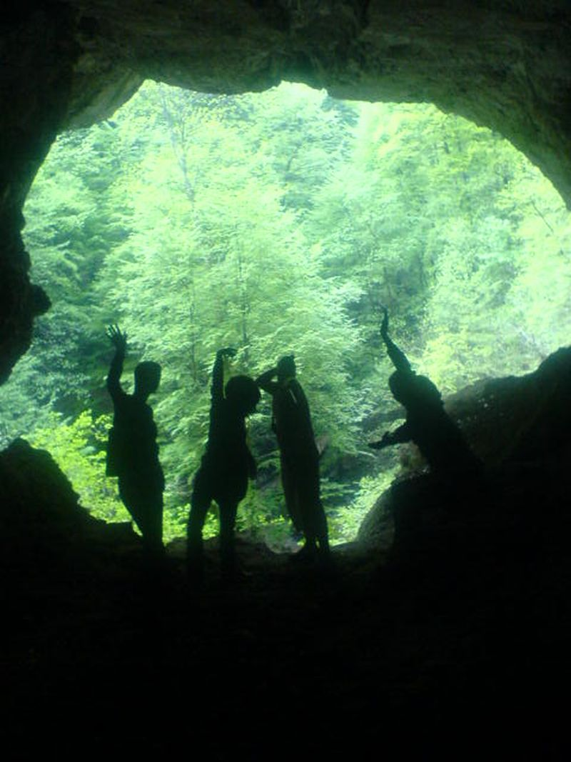 SKRAD Muževa Hiža (Man's house)